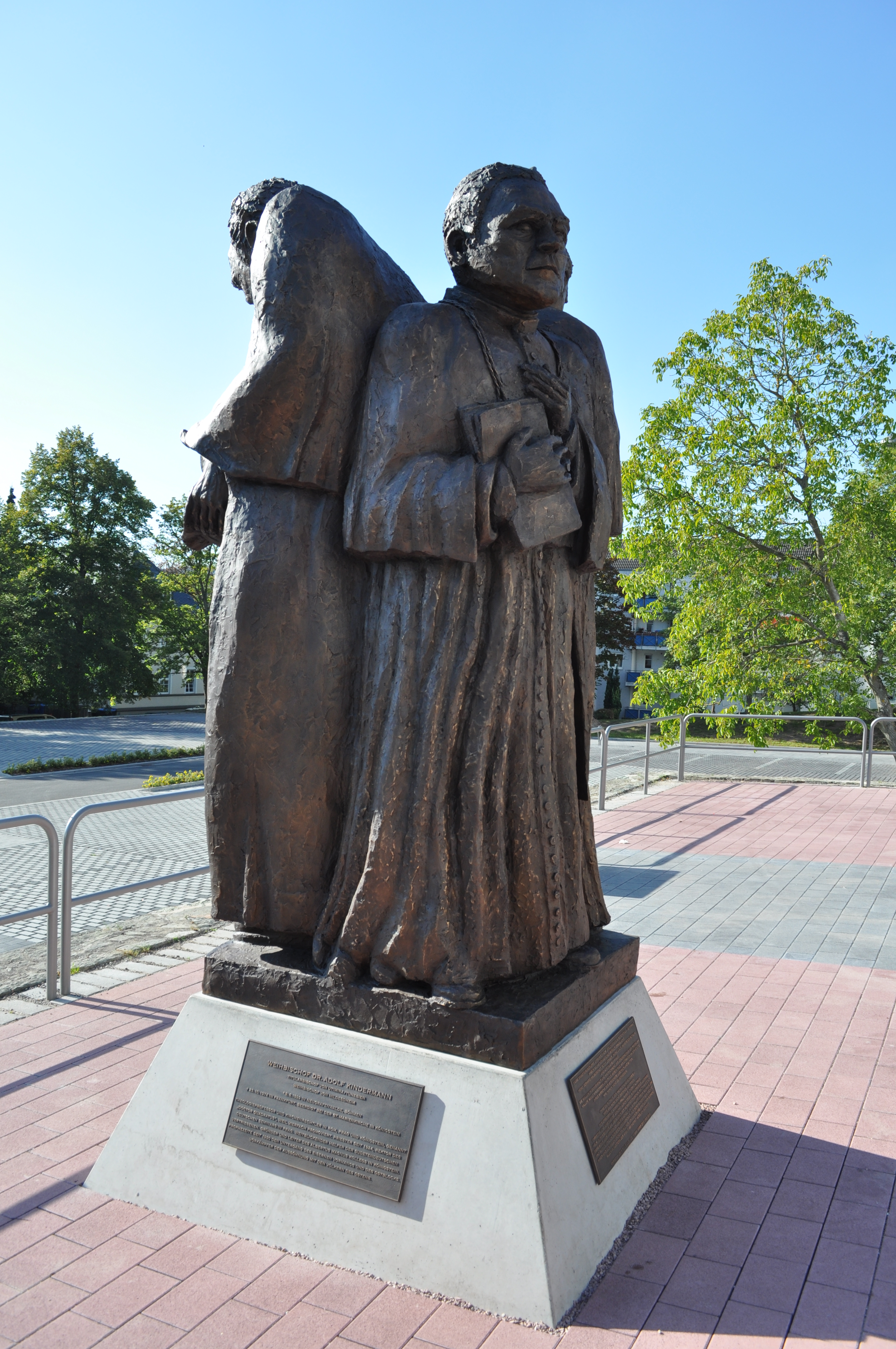 Denkmal für die Königsteiner Kirchenväter in Königstein im Taunus. Das Denkmal wurde von Christoph Loch entworfen und am 1. September 2011 eingeweiht. Das Bild zeigt die Figur von Adolf Kindermann